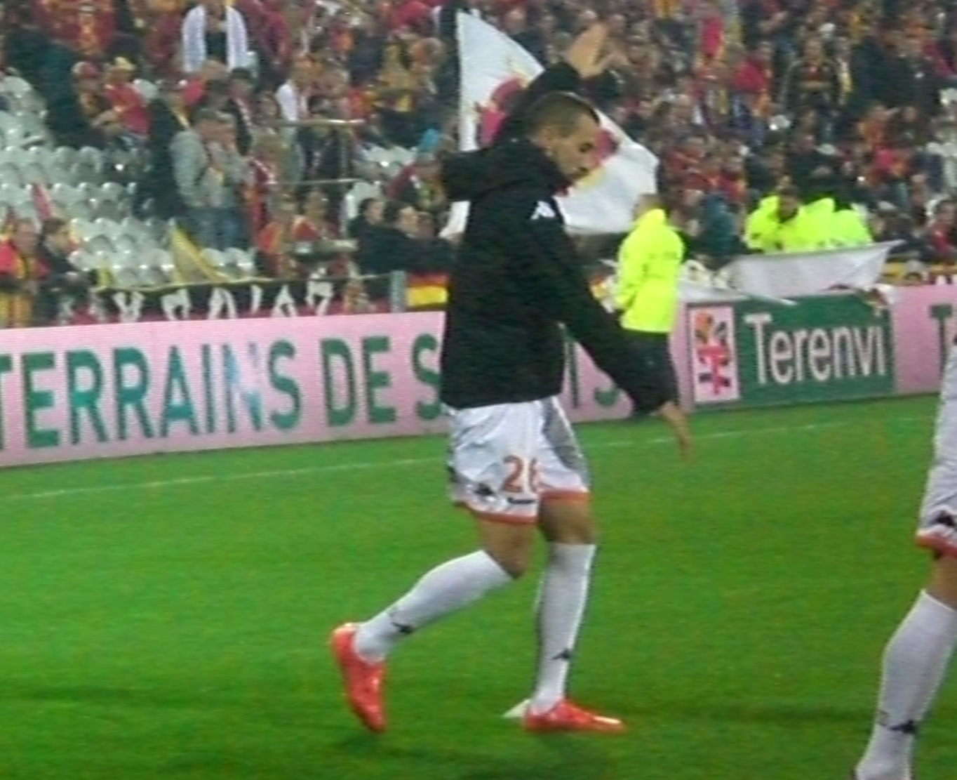 Fouad Chafik avant le match RC Lens / Stade Lavallois, comptant pour la onzième journée du Championnat de France de football de Ligue 2, le 19 octobre 2015, au Stade Bollaert Delelis